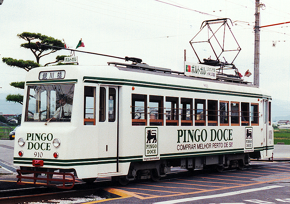 土佐電鉄 910形 元リスボン市電